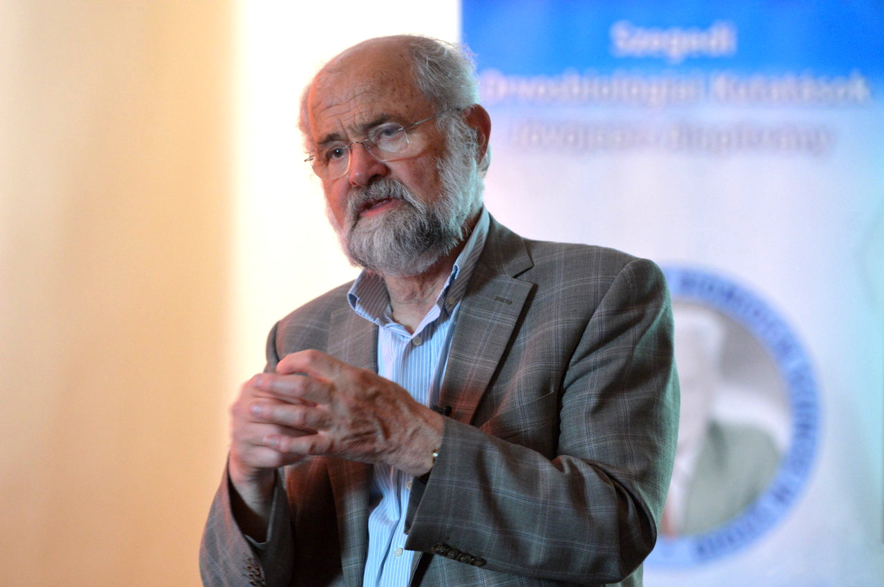 Erwin Neher Nobel-díjas biofizikus Szegeden, a Pharmakológiai Intézetben